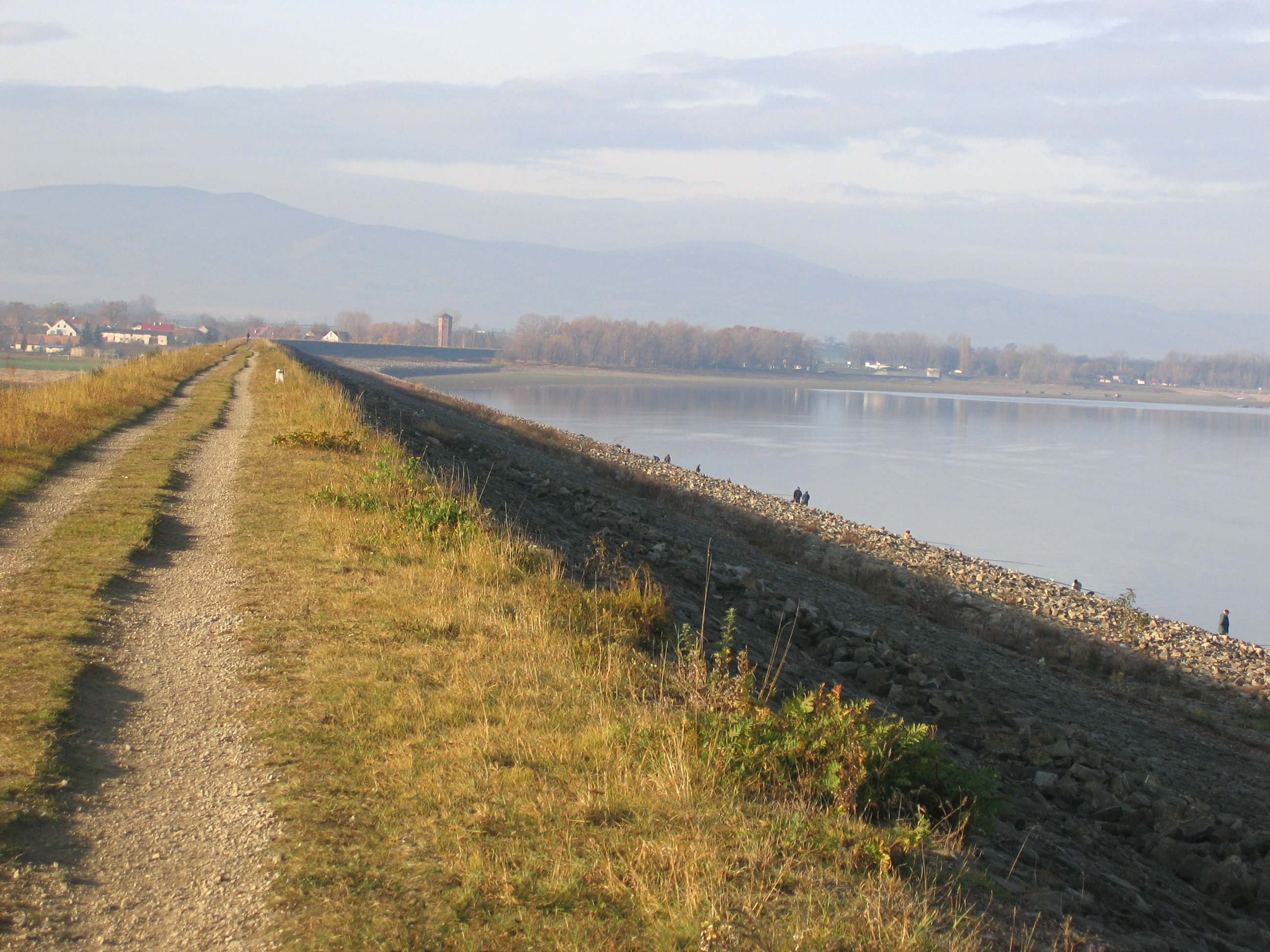 Jezioro Otmuchowskie